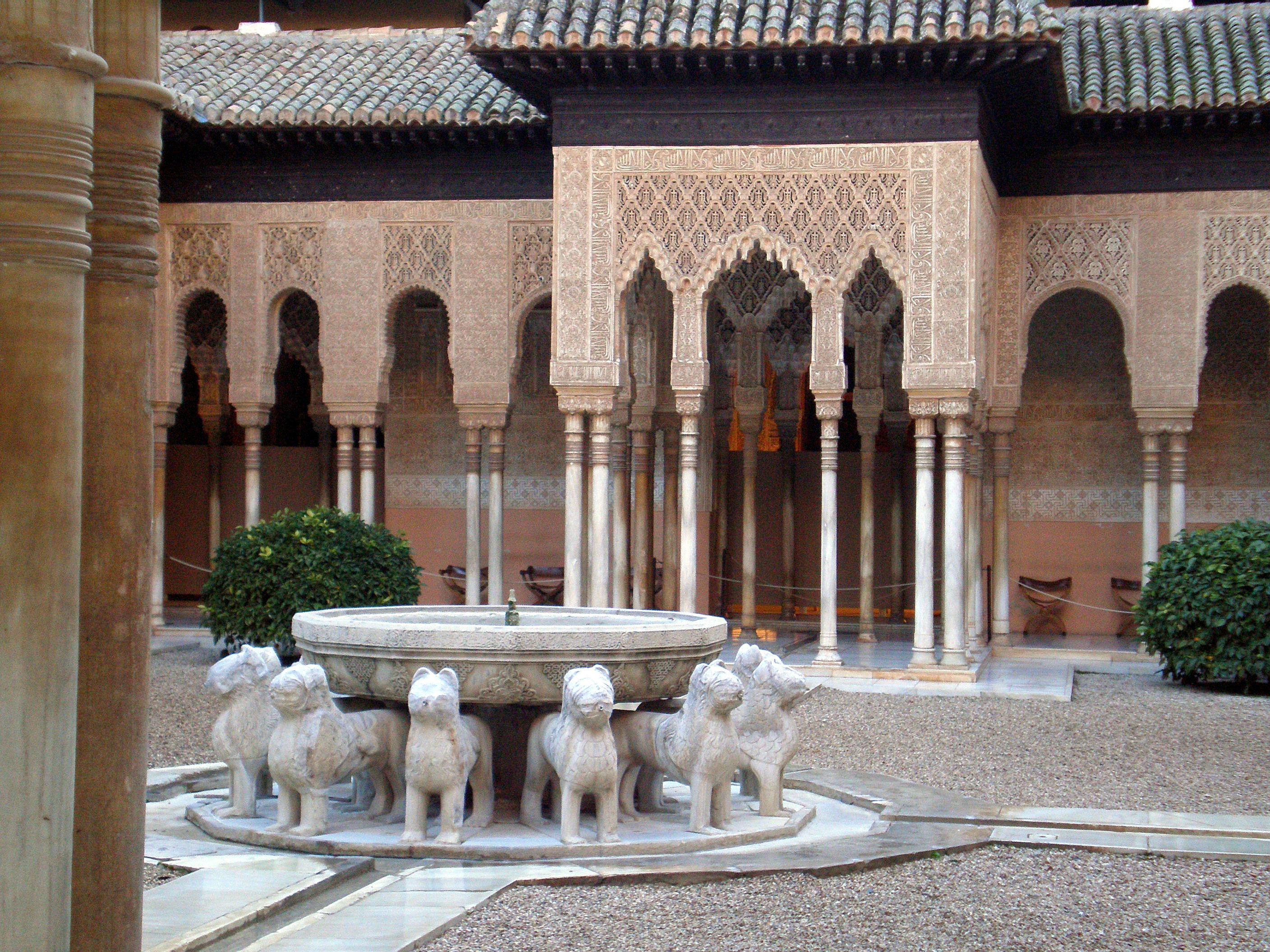 Fuente de los Leones en la Alhambra de Granada, España.